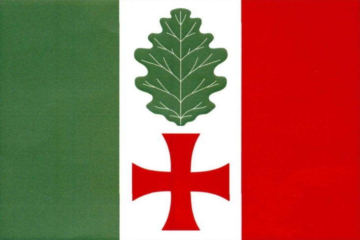 vlajka, Horní Dubňany, okres Znojmo